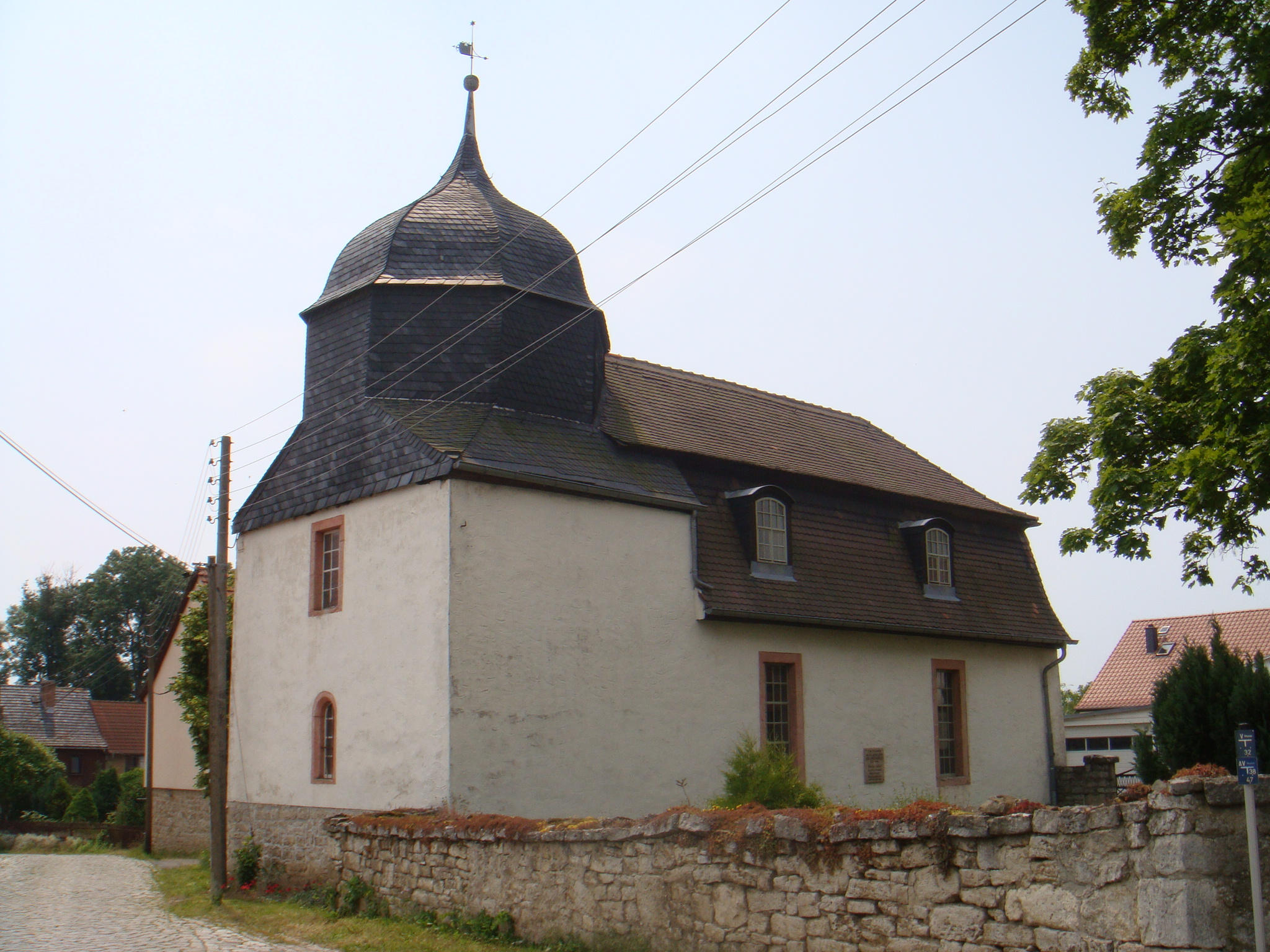 Dorfkirche 2010